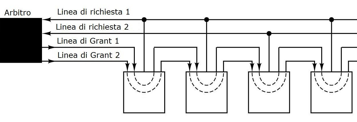 a festone